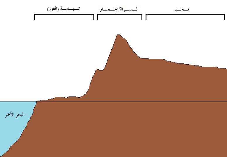 مقطع عرضي لطبوغرافية الجزيرة العربية موضح عليها مواضع تهامة والسراة ونجد.